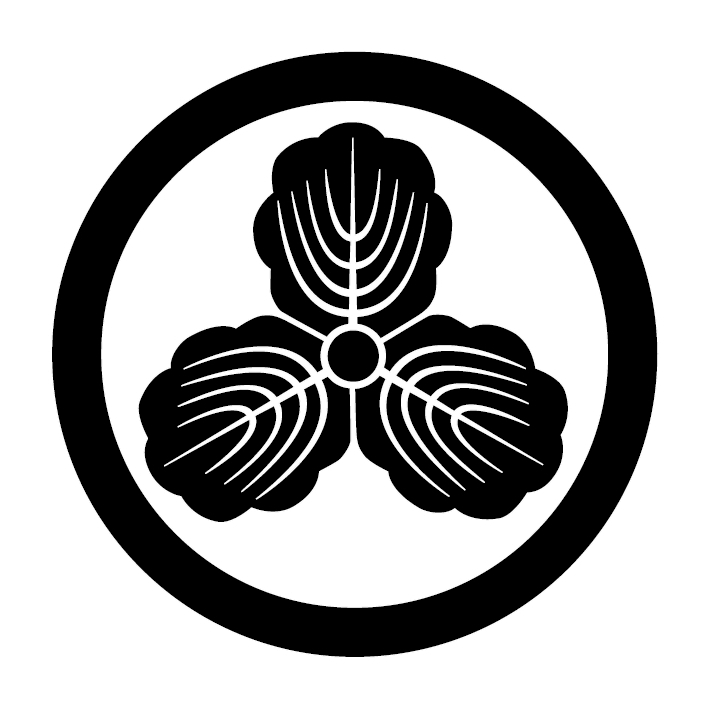 立正同心教会寺紋